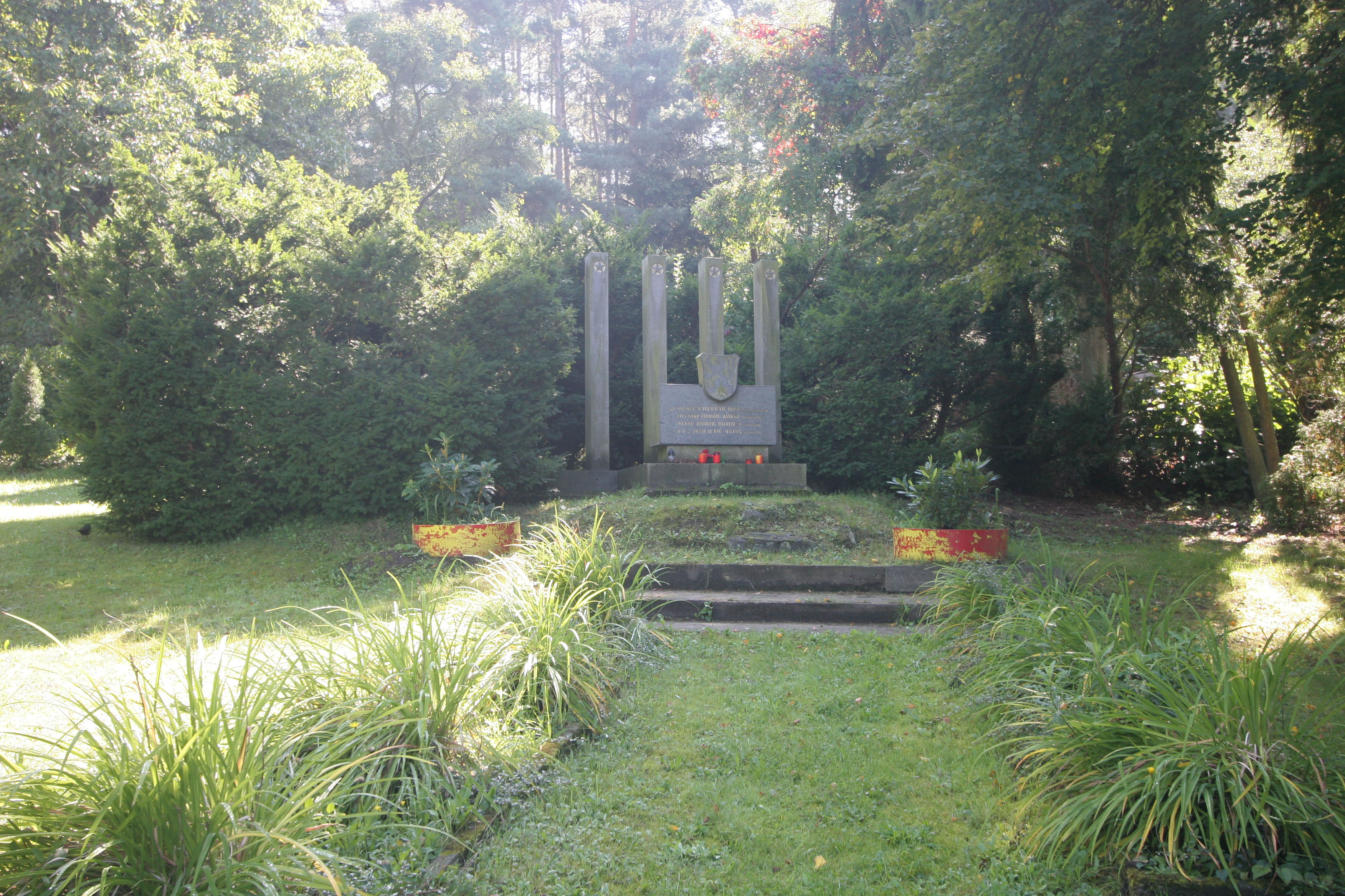 Pomník partyzánům, Krasnice.